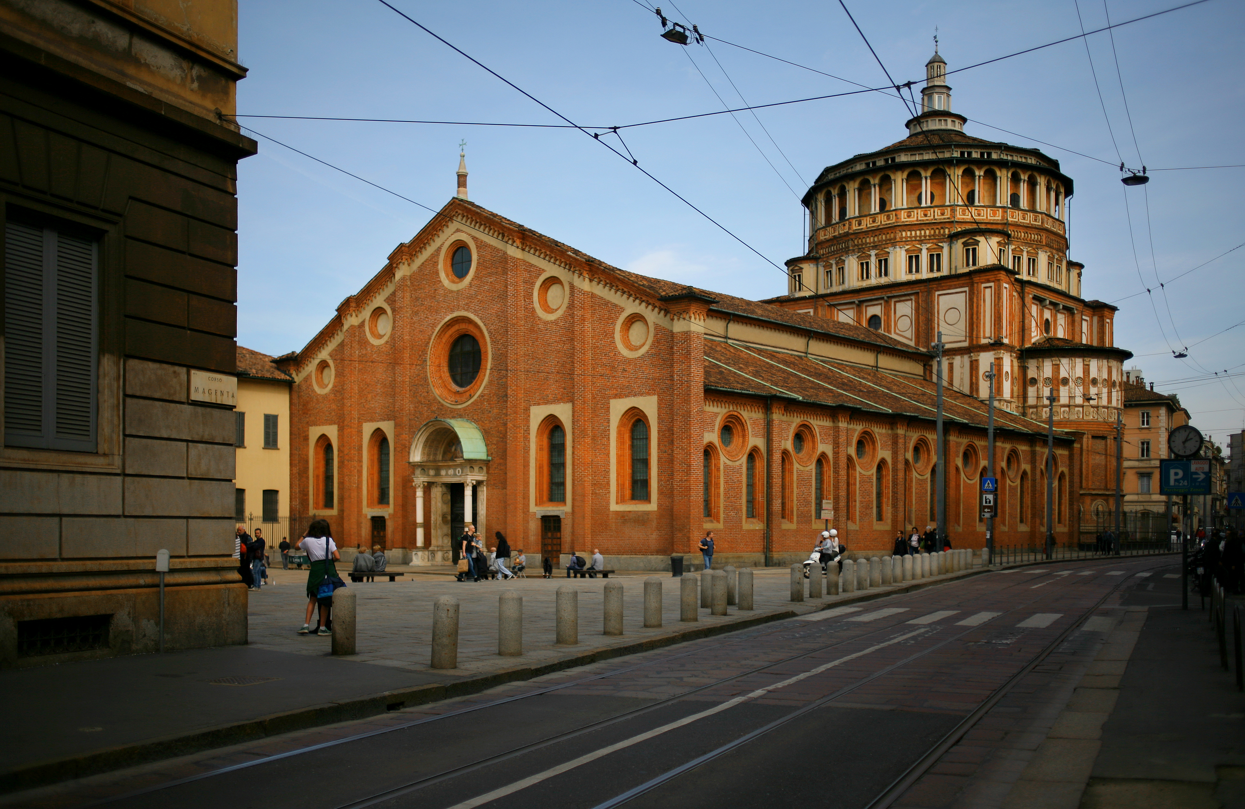 Santa Maria delle Grazie, Milano, vista di tre quarti dal Corso Magenta